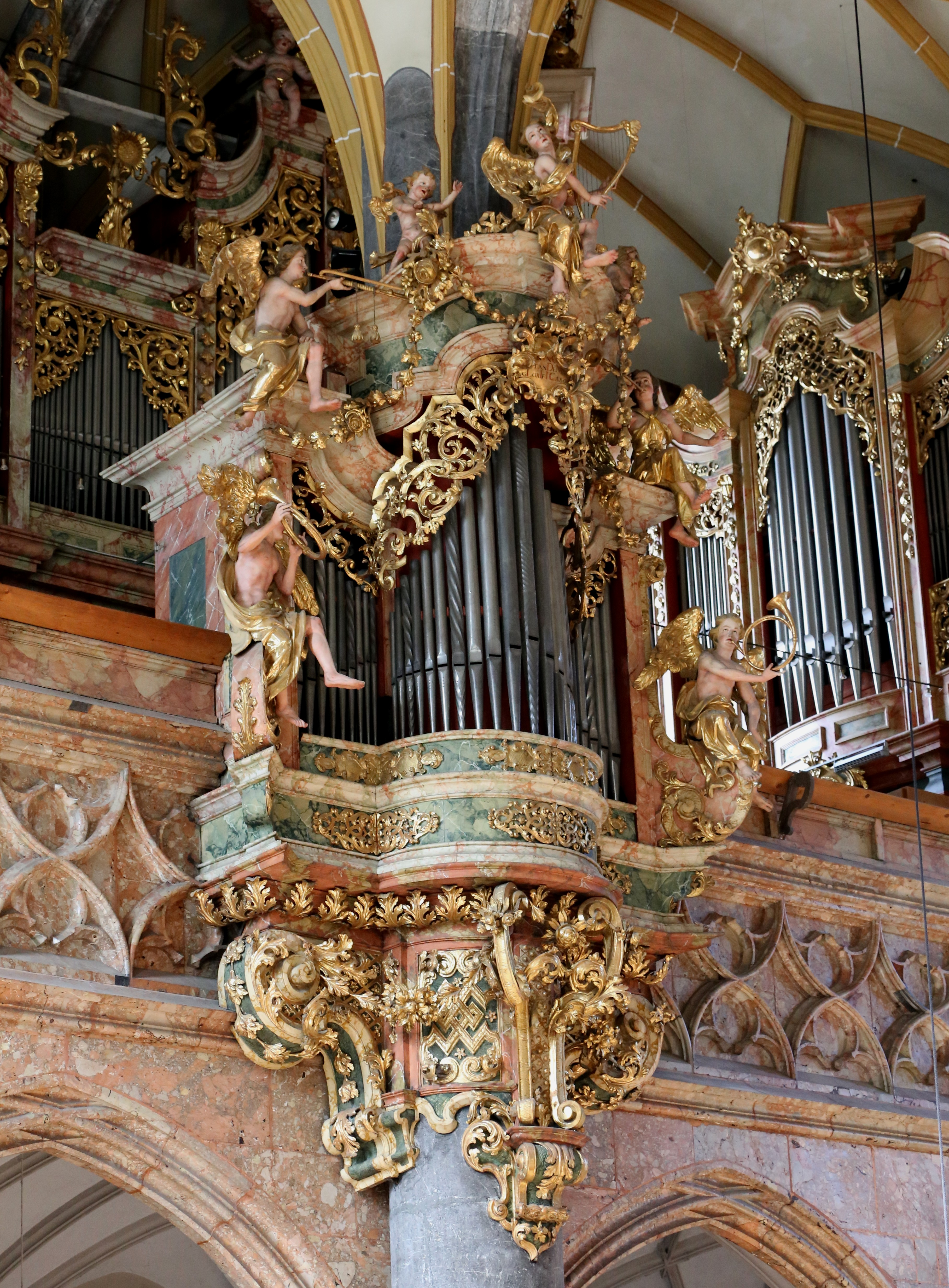 Kath. Pfarrkirche Mariae Himmelfahrt, Schwaz; die vierschiffige Hallenkirche mit Nordturm wurde von 1460 bis 1478 zunächst dreischiffig erbaut und bereits ab 1490 vergrößert, unter anderem um die zweigeschoßige südliche Sakristei. Die beiden sechsjochigen Hauptschiffe weisen Rautensterngewölbe auf, die beiden Chöre Rautennetzgewölbe. Der neugotische Hochaltar im linken Chor entstand 1913 This media shows the remarkable cultural object in the Austrian state of Tyrol listed by the Tyrolean Art Cadastre with the ID 12394. (on tirisMaps, pdf, more images on Commons)